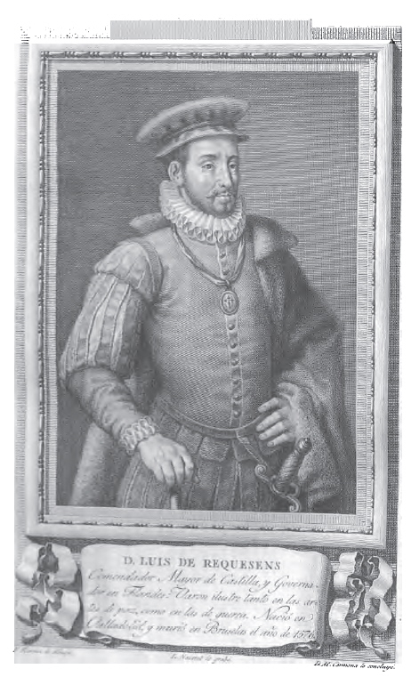 Retrato de Luis de Requesens.